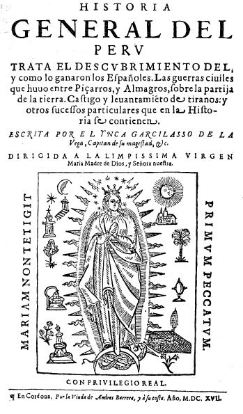 Portada de la "Historia General del Perú", del Inca Garcilaso de la Vega, edición princeps, 1617